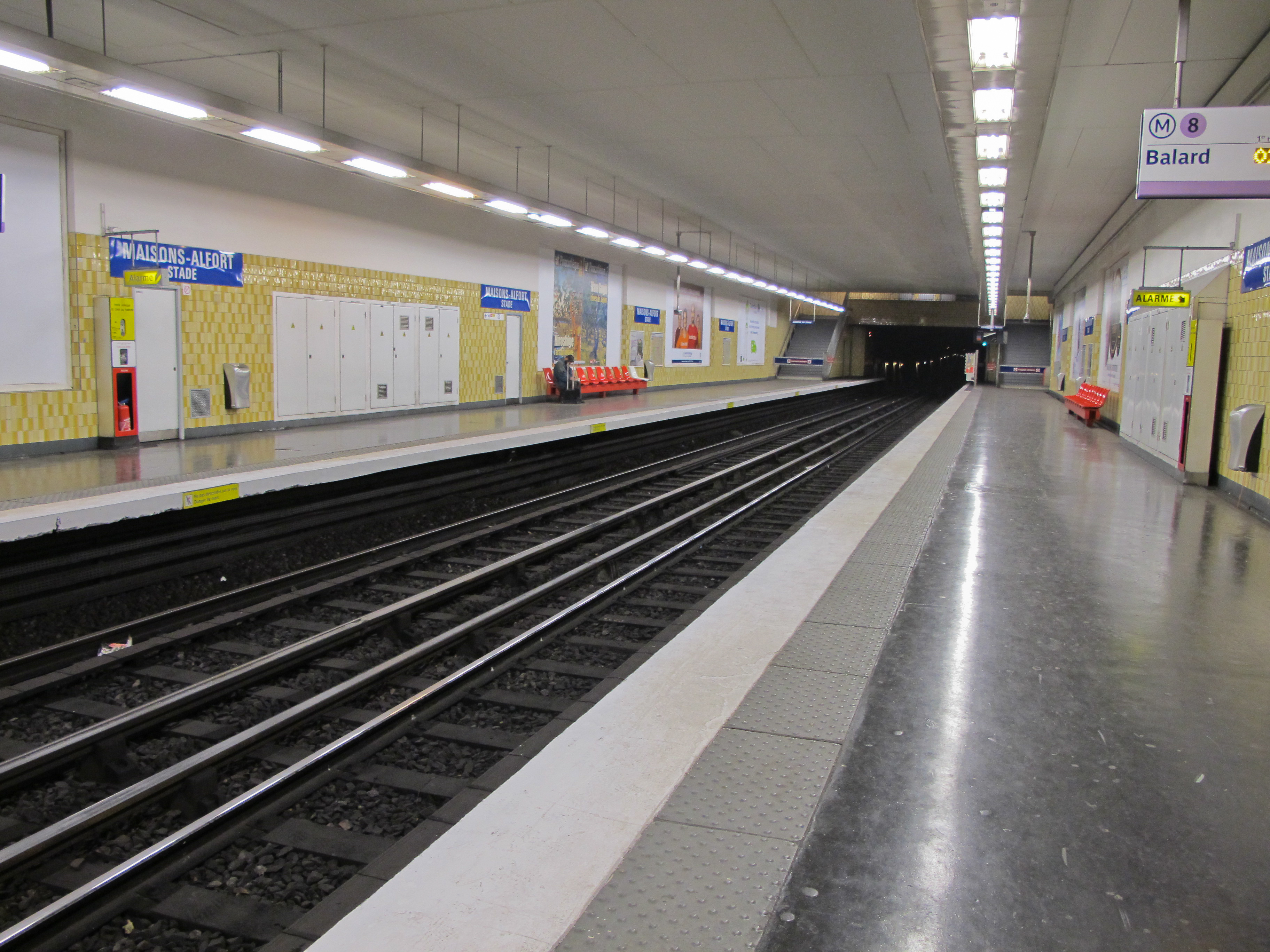 Station Maisons-Alfort - Stade. Ligne 8 du métro de Paris - Paris, France